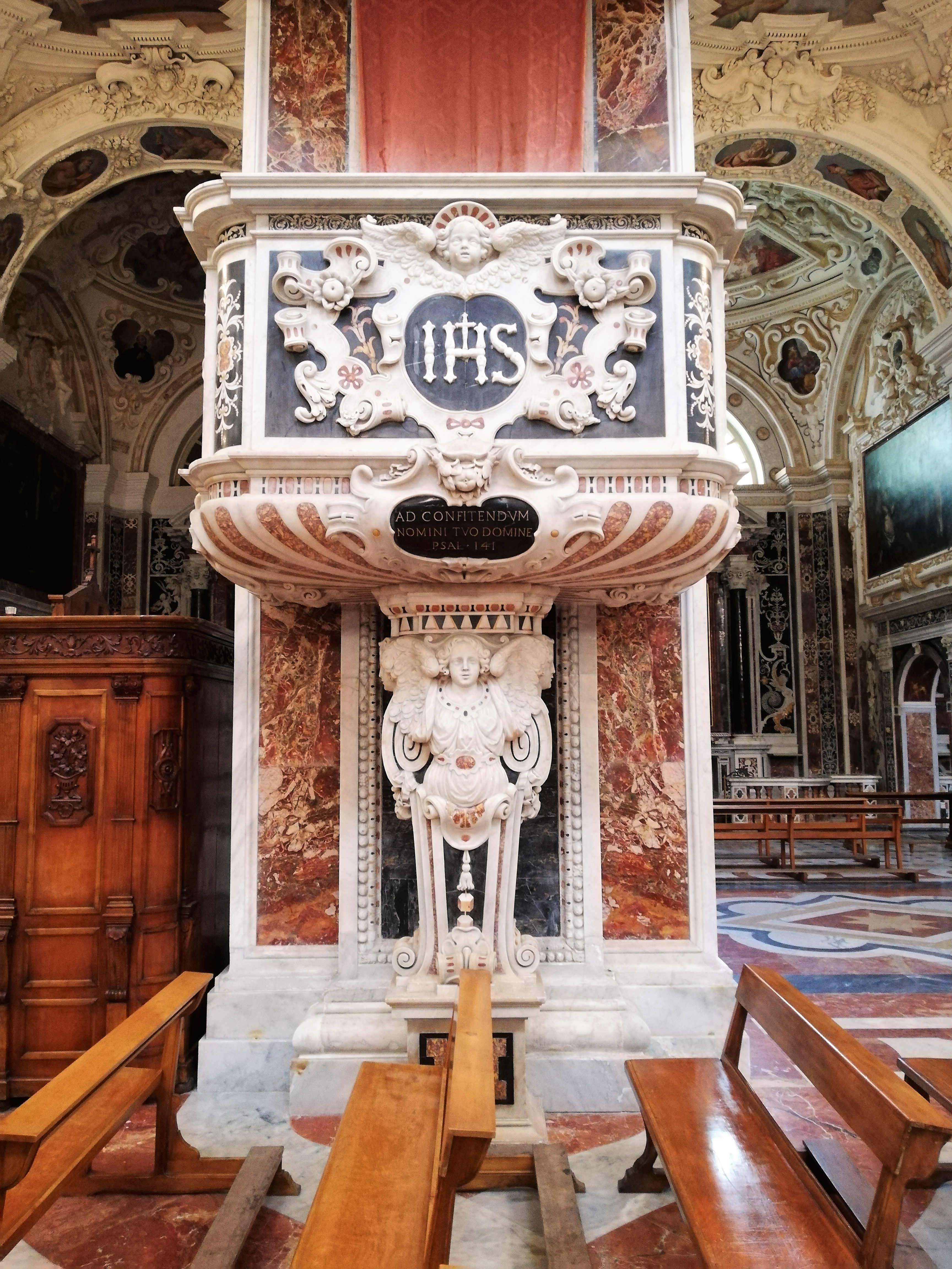 Pulpito.